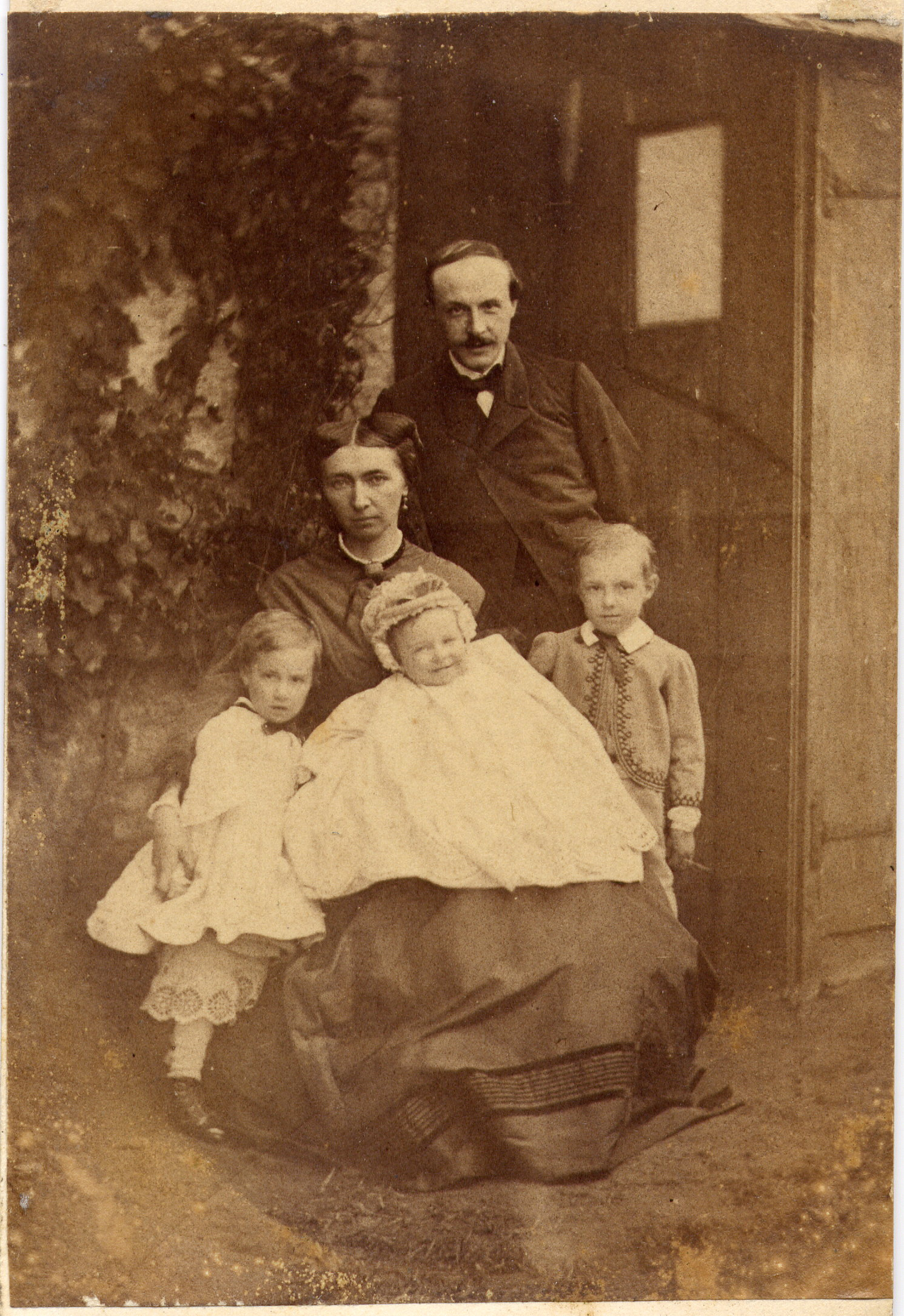 Photographie vers 1867 de Sophie Straatman et de son mari Charles Mogin et leurs trois premiers enfants. Sophie Adrienne STRAATMAN, née le 26 septembre 1833, décédée le 10 février 1889, épousa à Bruxelles le 29 juillet 1858, Charles Jacques MOGIN, sous-lieutenant d’artillerie puis commissionaire-expéditeur (firme Lambert Straatman) né à Bruxelles le 4 juin 1834, décédé le 19 avril 1877. Ils eurent quatre enfants: a) Lambert MOGIN, né le 28 mai 1859 b) Jeanne MOGIN, née le 17 avril 1861, épousa le 21 janvier 1882, Ernst EIFFE, Allemand venu jeune homme apprendre le commerce chez Lambert Straatman, né à Hambourg le 23 mai 1855, décédé à Anvers le 27 février 1914. c) Josy MOGIN, née le 3 août 1867, décédée en 1935, épousa le 16 novembre 1889, Willy EIFFE, né le 5 avril 1864, décédé le 21 mars 1898. d) Edmond MOGIN, né le 7 novembre 1869, décédé après 1899. Lire: Jurisprudence du port d'Anvers, 16 août 1866: 3.- Du 16. - Acte de société en nom collectif entre Lambert Straatman, commissionnaire-expéditeur, à Bruxelles, Charles Mogin et Joseph Urbig, commissionnaires-expéditeurs à Anvers, pour la continuation de l'exploitation de la maison de commission existant à Anvers sous la firme: L. Straatman, (gérée en dernier lieu par Jean Urbig, depuis décédé) et ce tant pour le camionnage que pour tout ce que comporte une maison d'expédition et de commission. - La société sera dirigée par Mogin et Urbig qui signeront tous deux ou chacun séparément par procuration L. Straatman. - La firme restera: L. Straatman. - Le siège est à Anvers, quai saint Pierre, n° 12. - Durée illimitée.